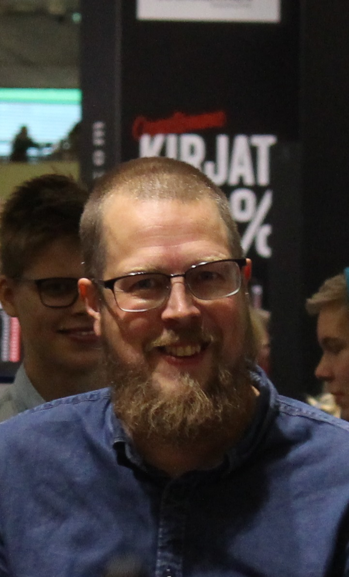 Tuomas Kyrö Helsingin kirjamessuilla 28.10.2016